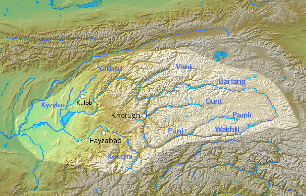 アフガニスタンとタジキスタンを流れるパンジ川（ピャンジ川）の流域地図